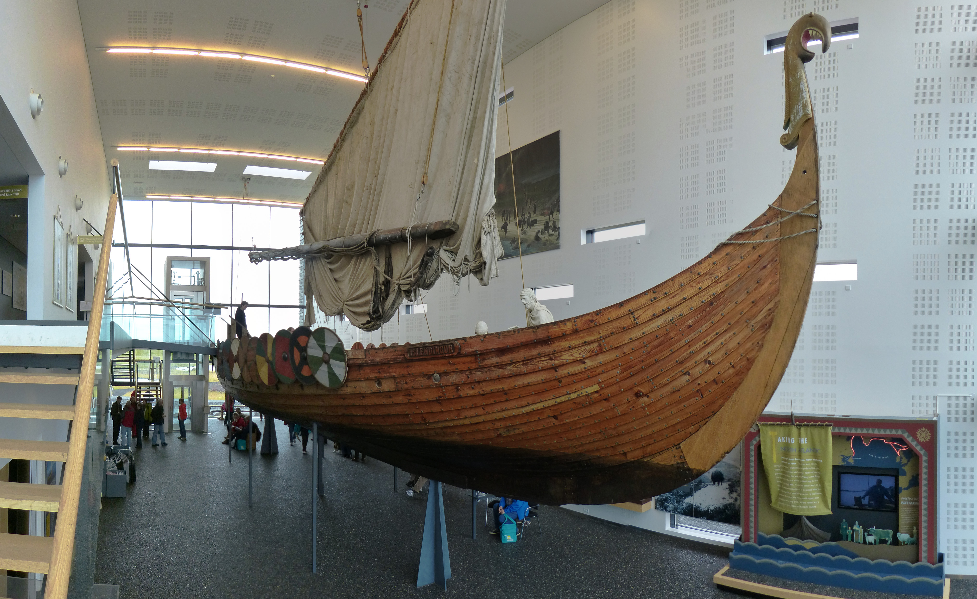 Die Íslendingur im Museum Víkingaheimar, Keflavík, Island. Panoramafoto aus Einzelaufnahmen gestitcht.